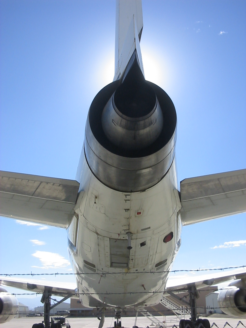 102-0288_IMG